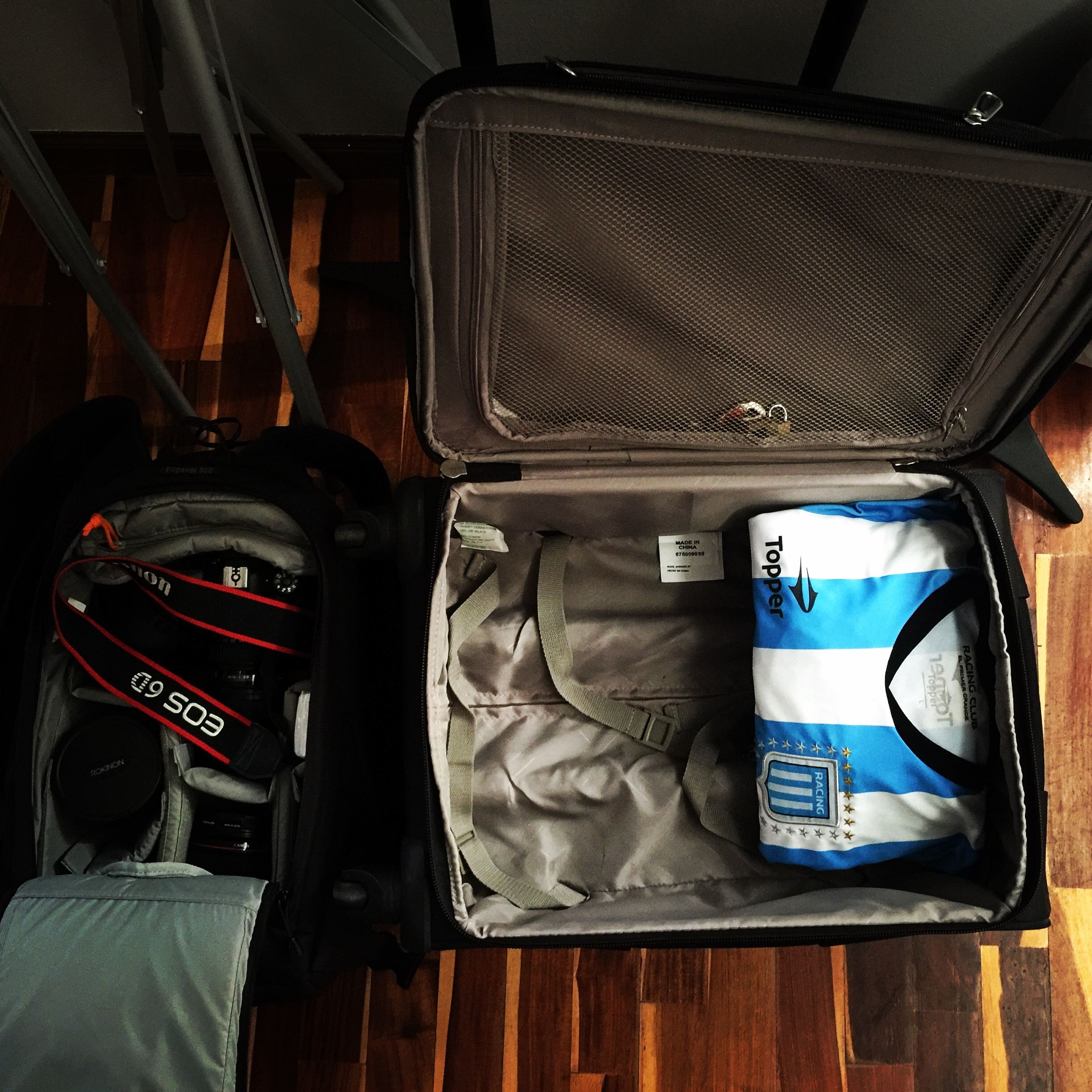 Project365 #073